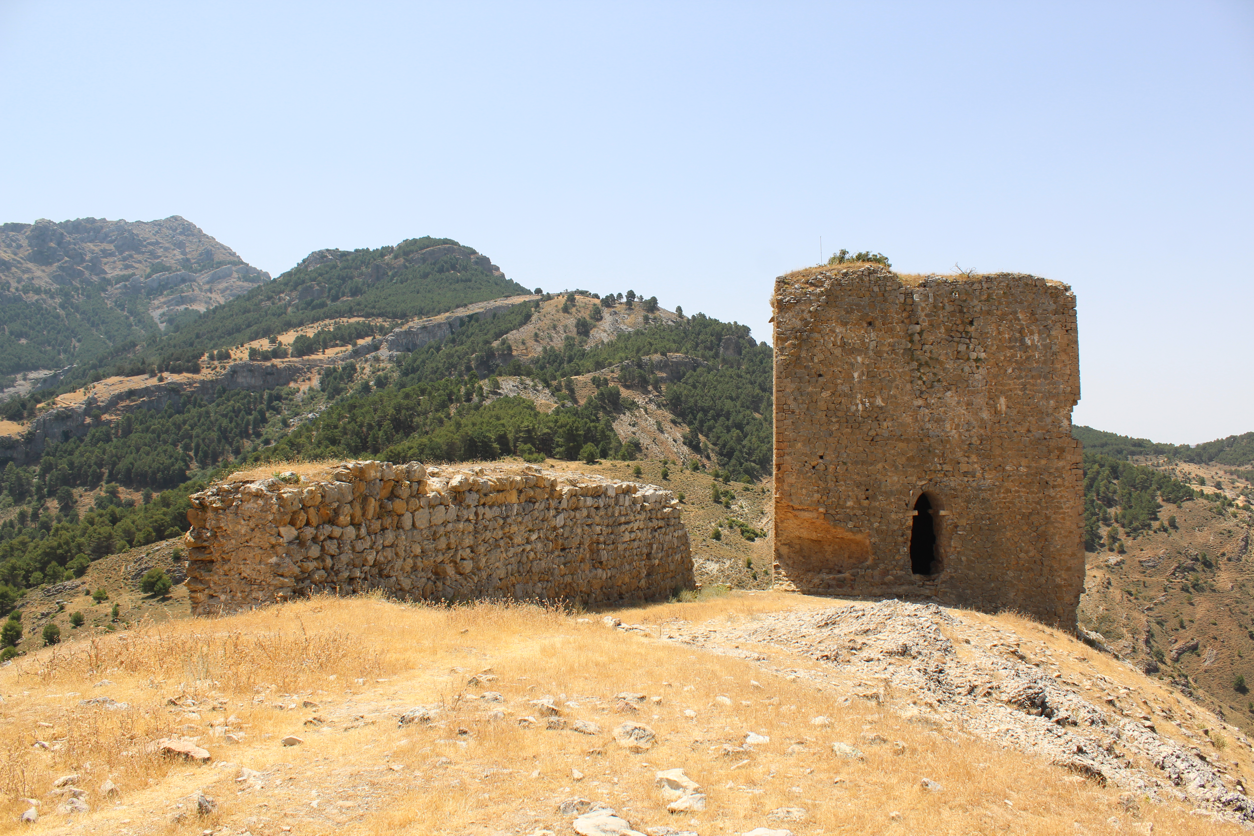 Vista del Castillo de las Cinco Esquinas desde el norte, junto a uno de los muros o lienzos que se han conservado.